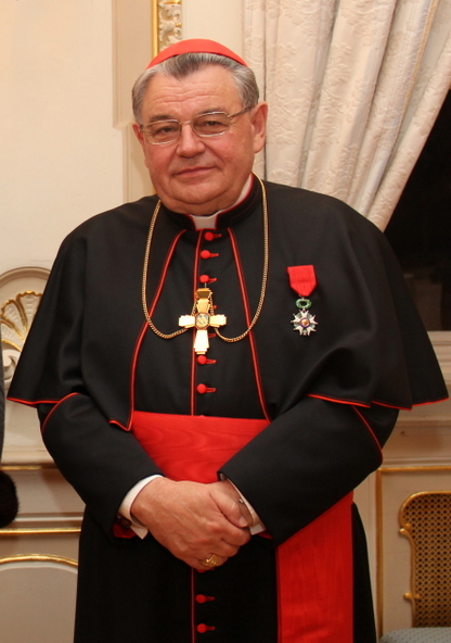 Domini Duka s Rádom Čestnej légie